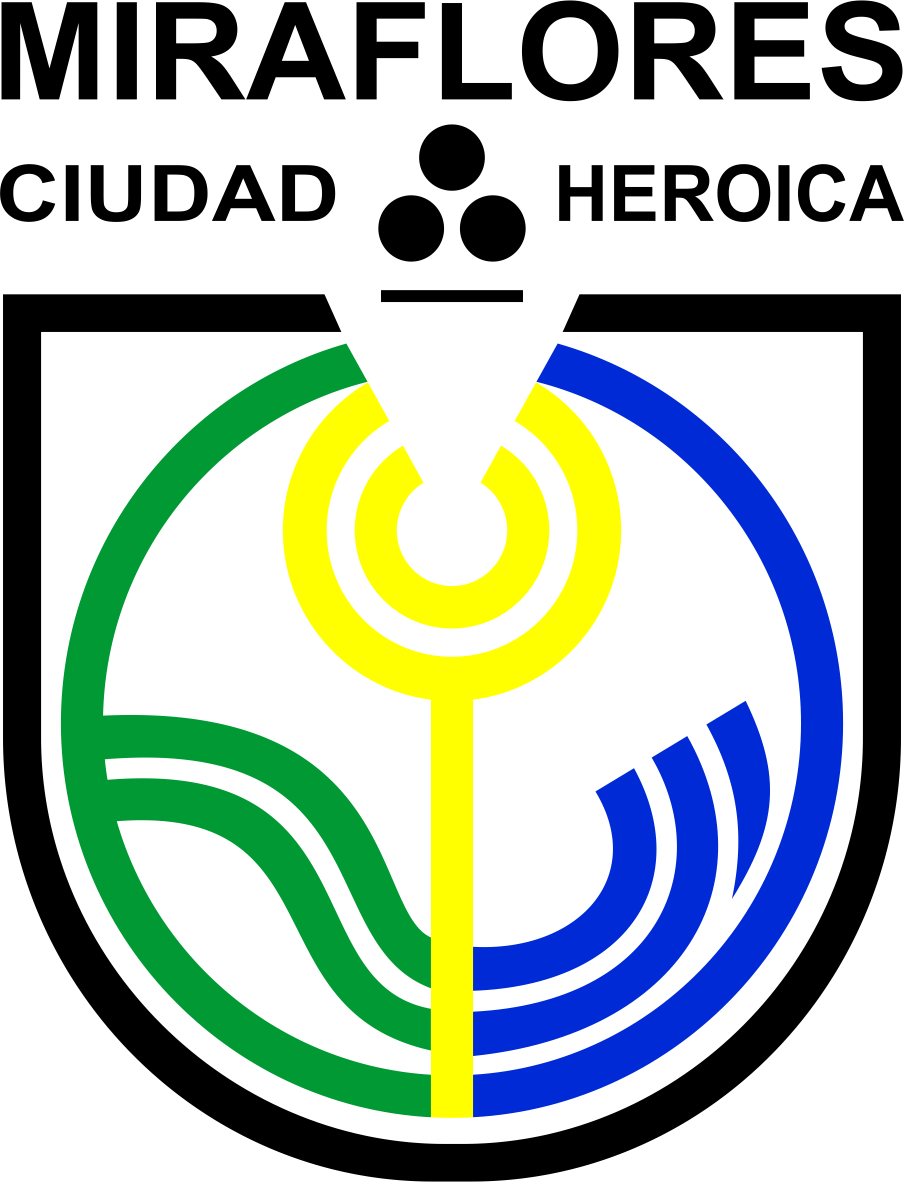 Escudo del distrito de Miraflores, Lima